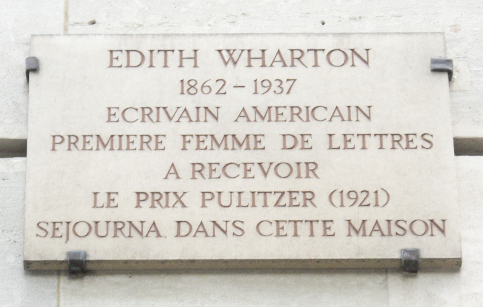 Plaque apposée au n° 3 de la place des États-Unis, Paris 16e. « Edith Wharton, 1862-1937, écrivain américain, première femme des lettres à recevoir le prix Pulitzer (1921), séjourna dans cette maison. »